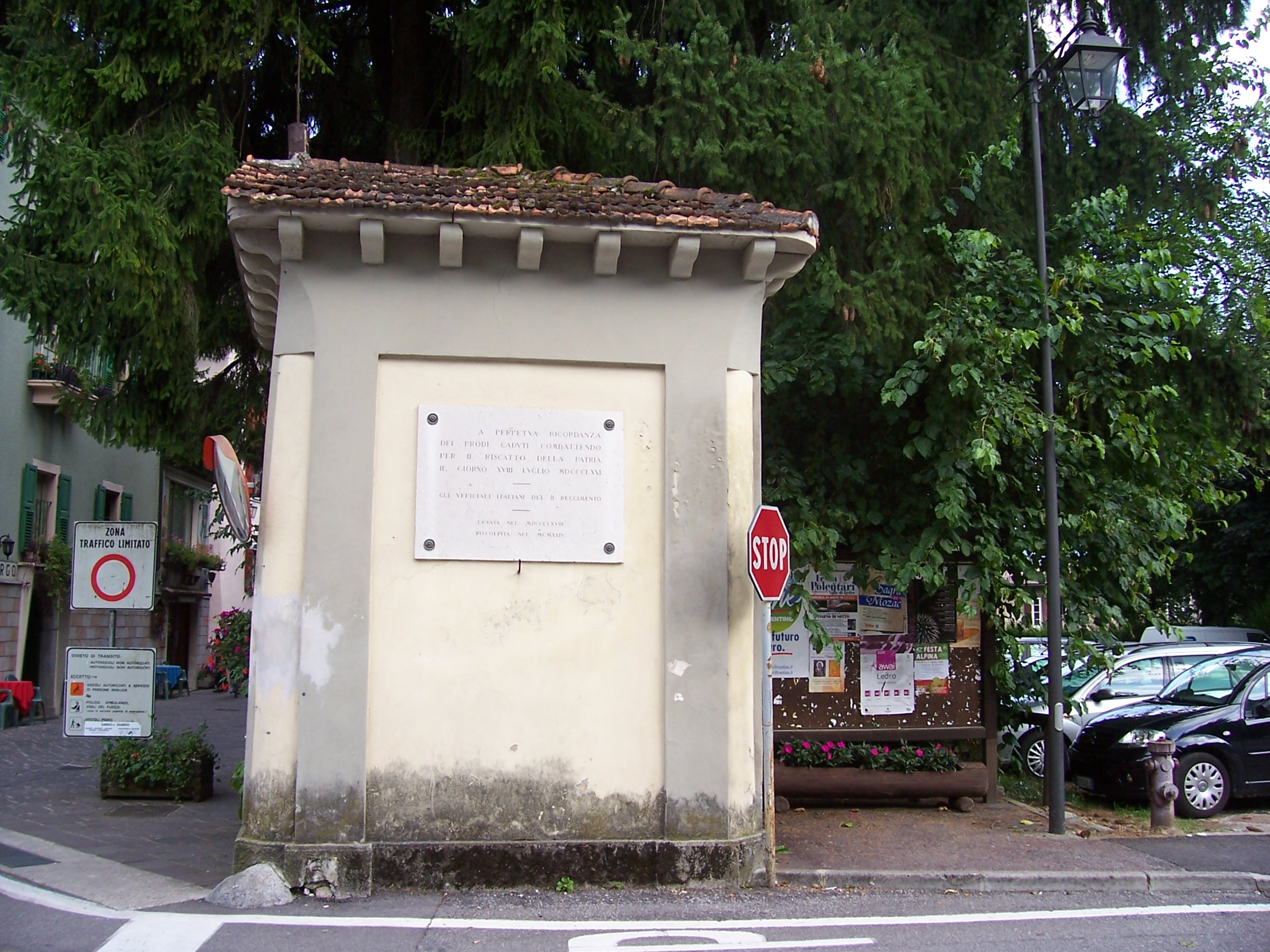 Capitello a Pieve di Ledro.